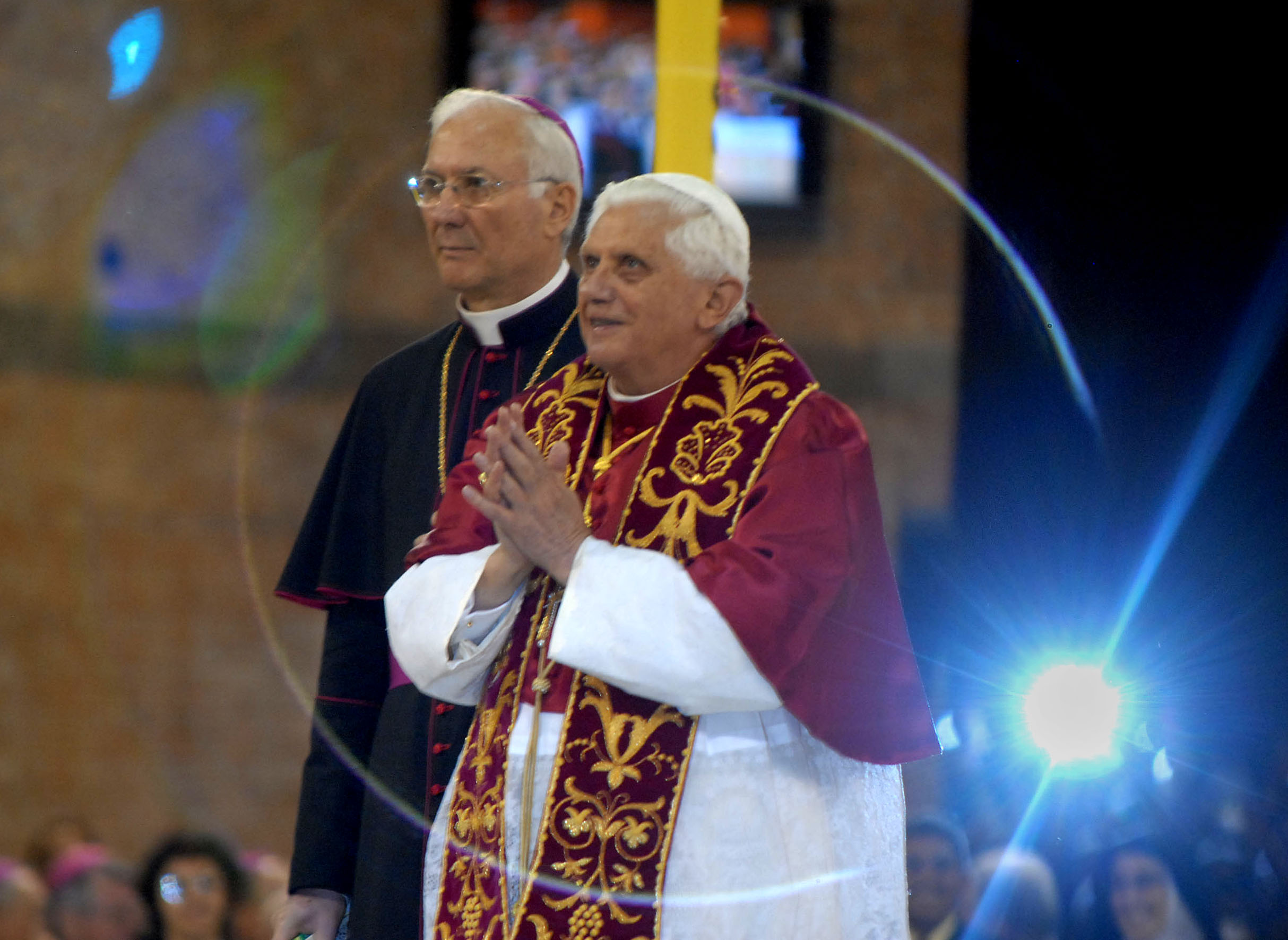 Papa Bento XVI durante cerimônia religiosa na Basílica de Nossa Senhora Aparecida, no interior do estado de São Paulo, Brasil.